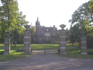 Landhuis van de familie Cremers, eigen foto